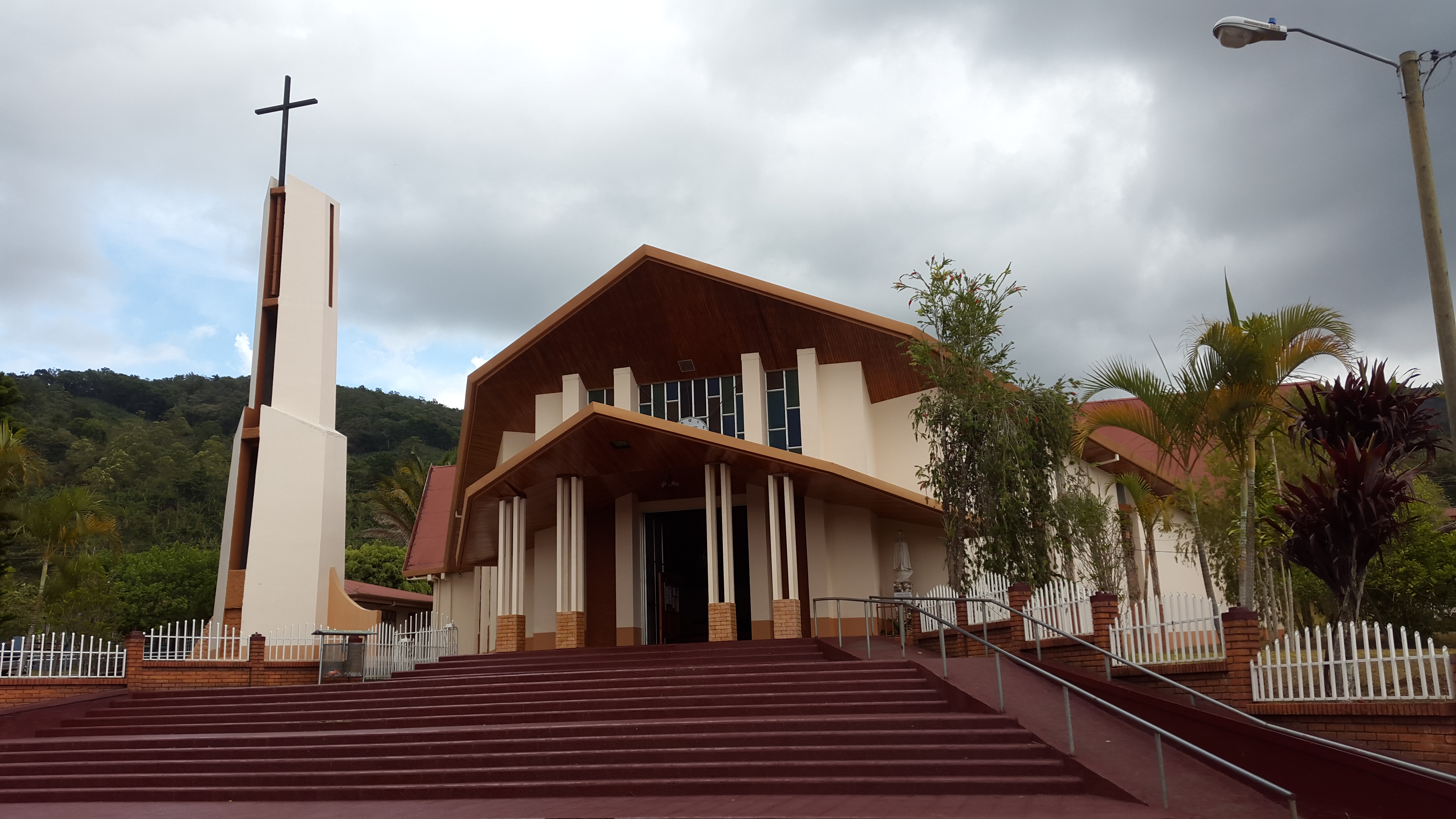 Iglesia de San Pablo de León Cortés, Costa Rica.